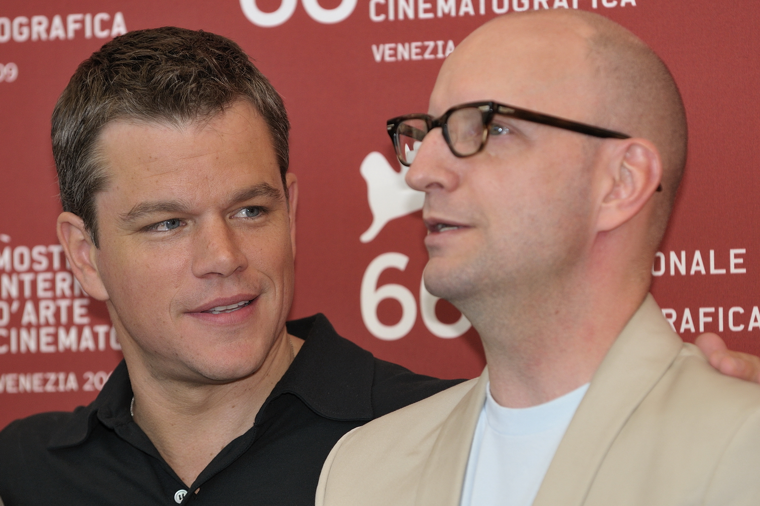 66ème Festival du Cinéma de Venise (Mostra), 6ème jour (07/09/2009) Photocall avec Matt Damon et Steven Soderbergh pour le film : The Informant